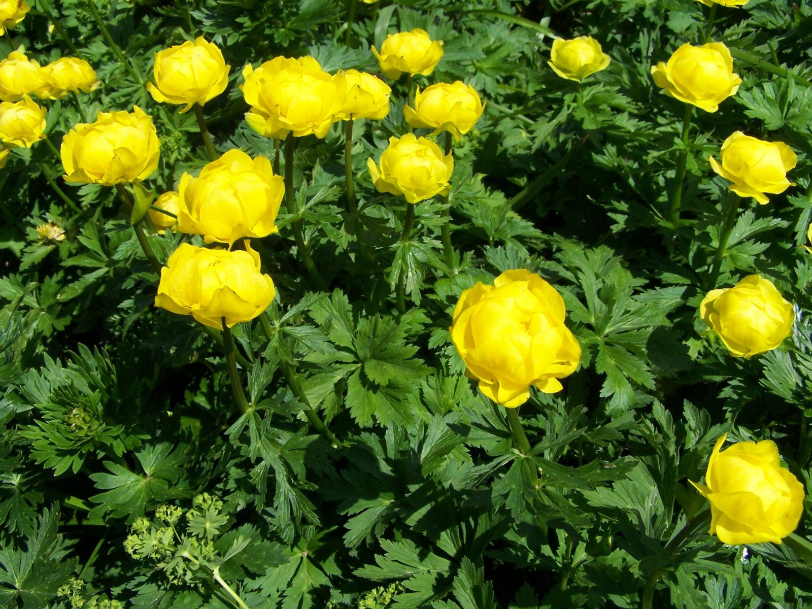 Trollius europaeus subsp. transsilvanicus (pl. pełnik alpejski), habitat: Tatra Mountains, Czerwone Wierchy, Małołącka Przełęcz